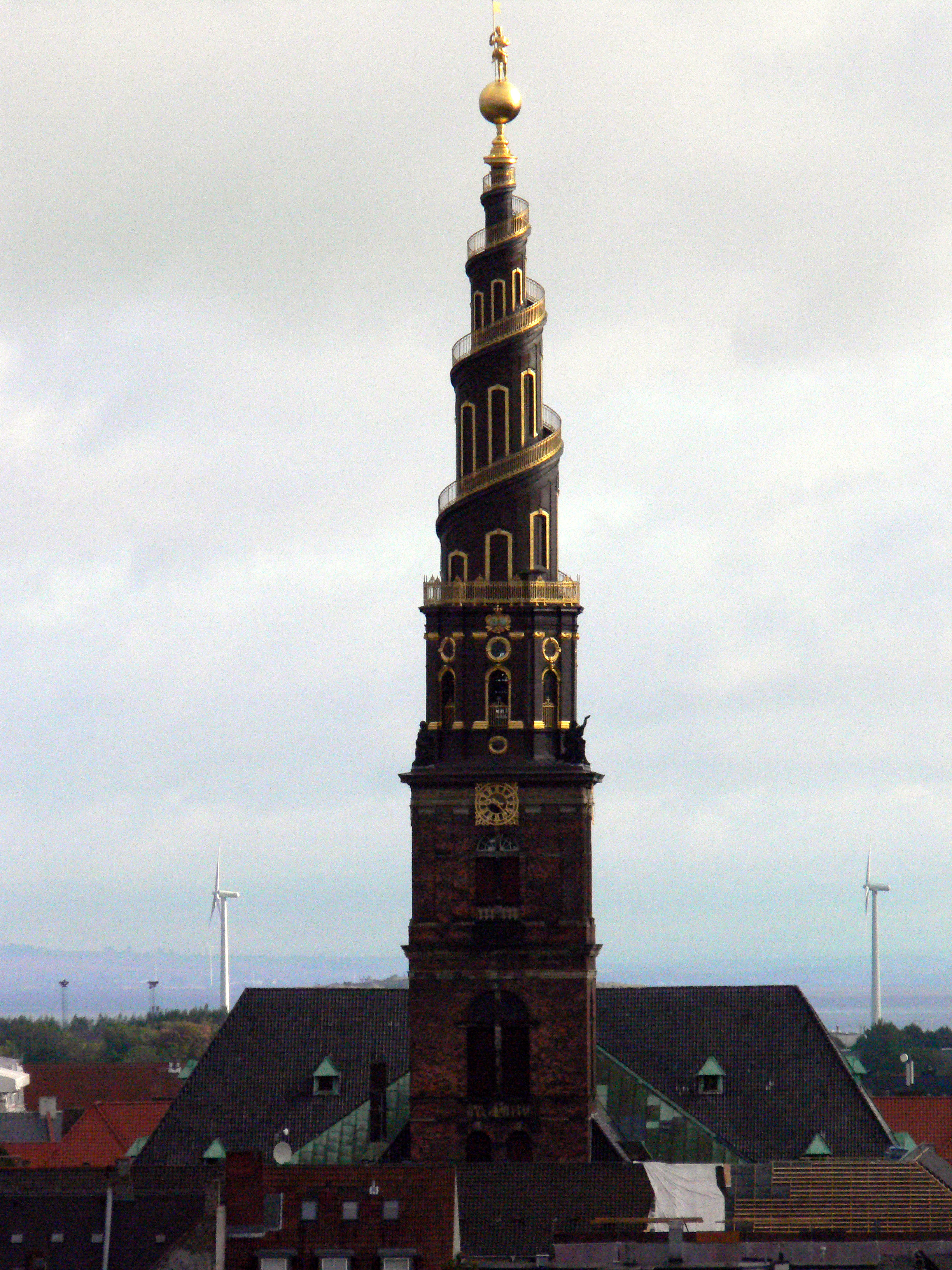 Vor frelsers Kirke in der Sankt Annæ Gade 29.